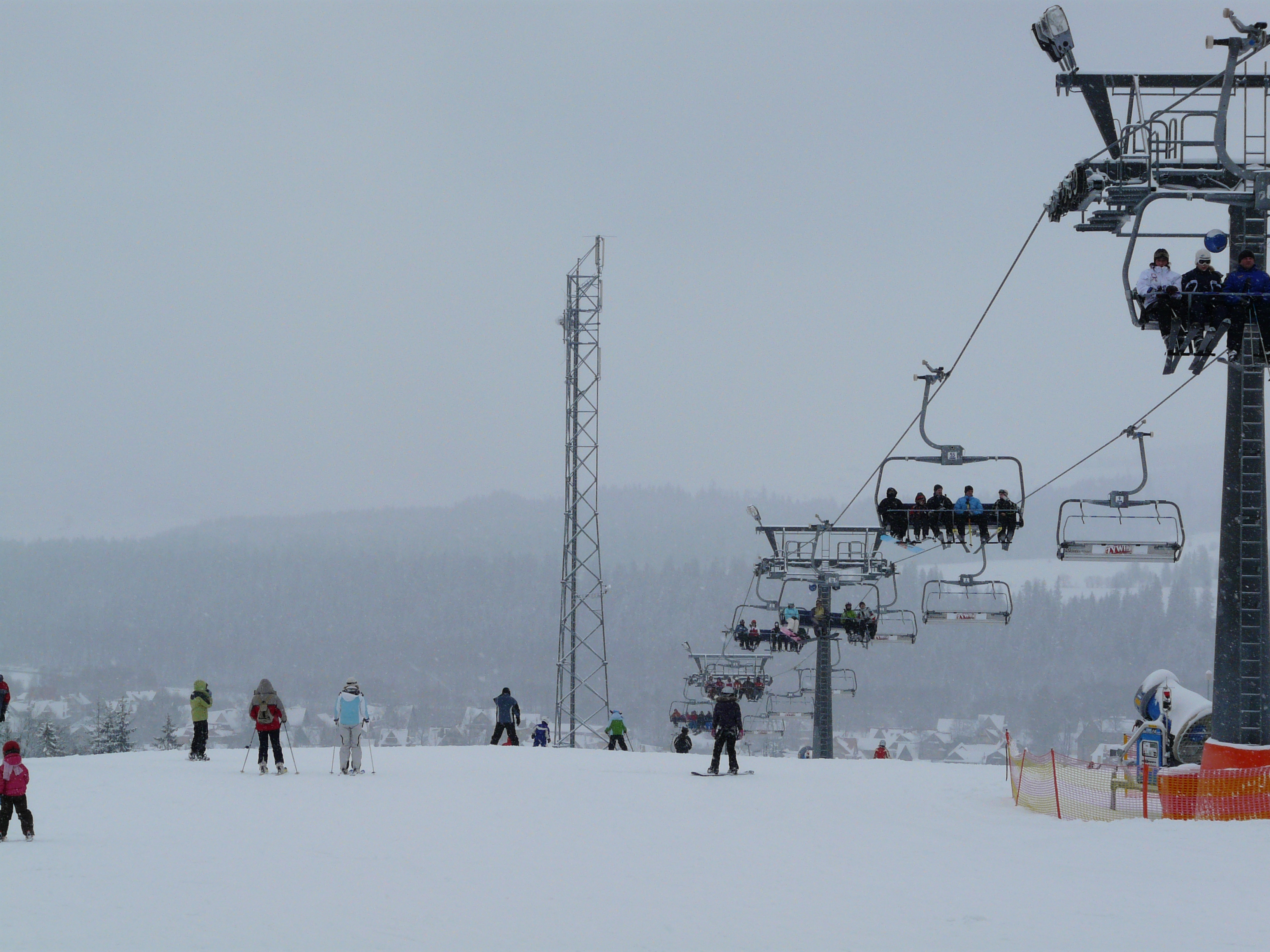 Białka Tatrzańska wyciąg, maszt komórkowy